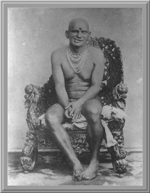 Shri Krishna Saraswati Swami Maharj, Kolhapur